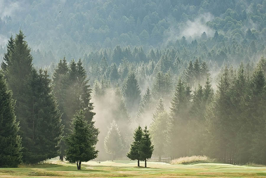 Autore: Luigi Dorigo, ripresa in settembre 2006, alberi nella piana del Cansiglio